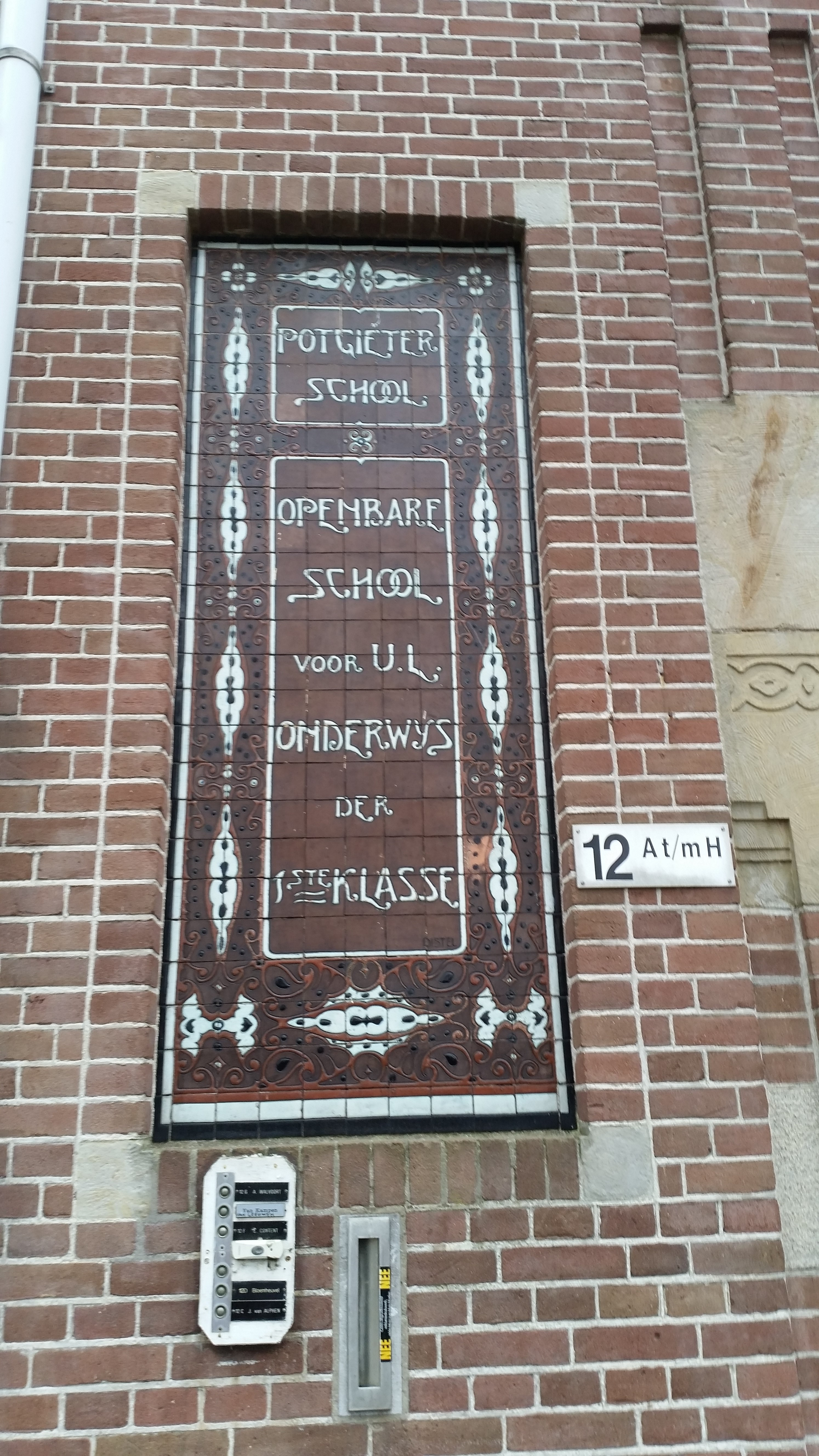 Potgieterschool op nummer Bilderdijkpark 12